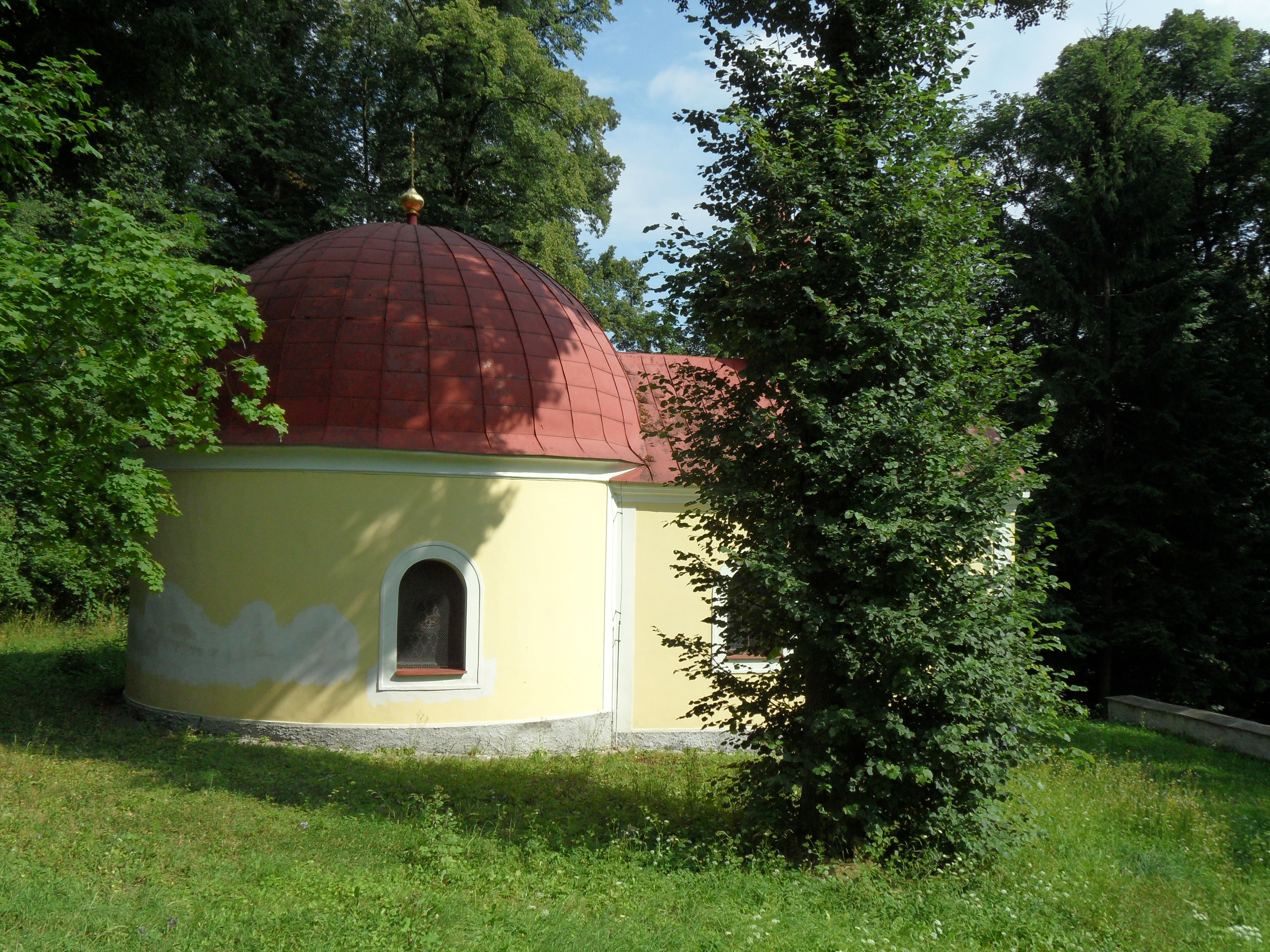 Výklenková kaplička Panny Marie, Roztěž.